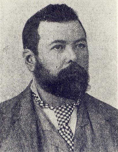 Josep Llunas i Pujals (Reus, 1852 - Barcelona, 1905) fou un obrer activista llibertari, catalanista, maçó i lliurepensador